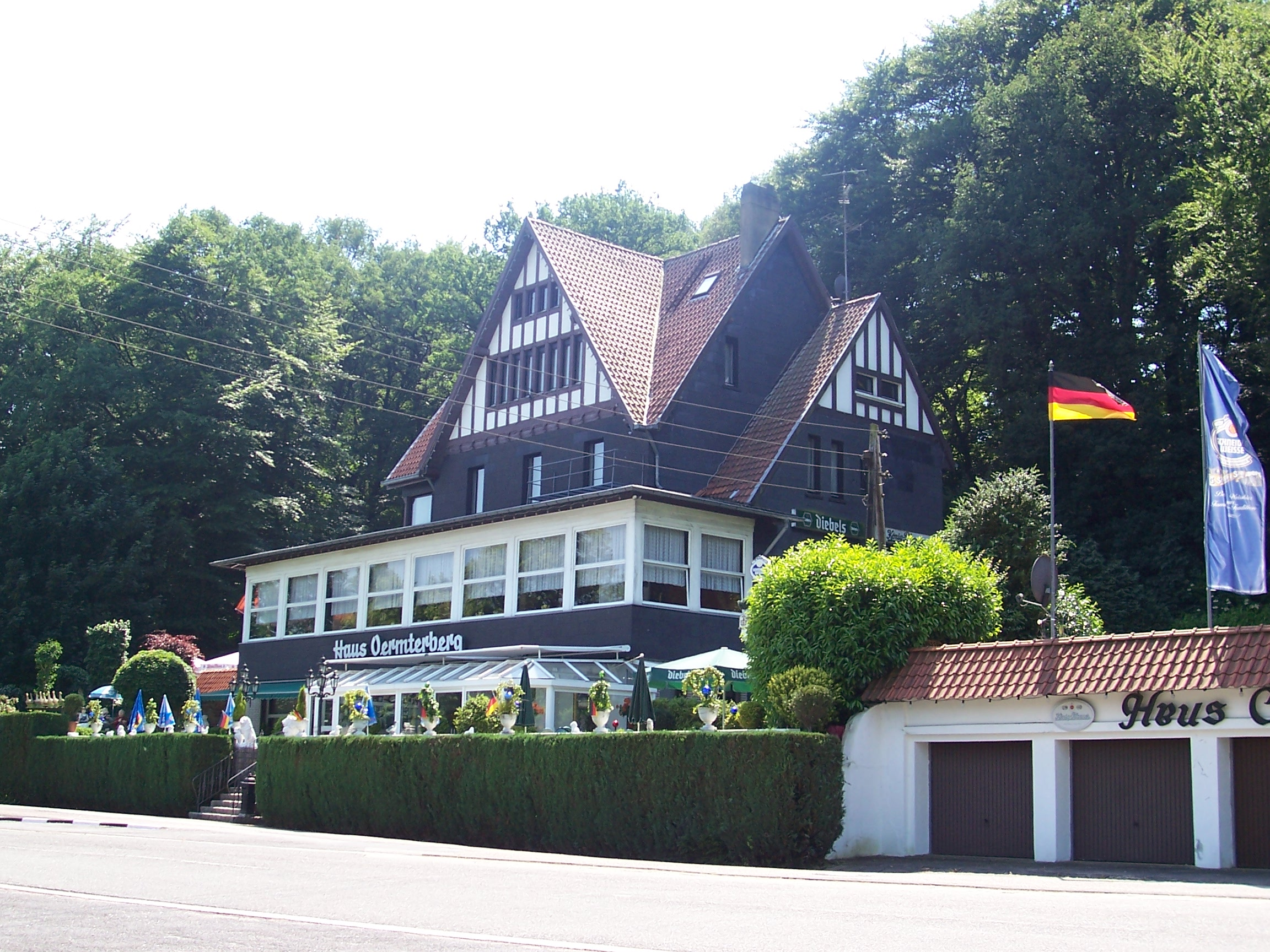 Haus Oermterberg at the Oermter Berg in Rheurdt, Germany